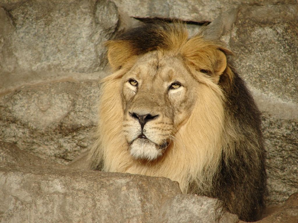 Löwe im Tierpark Berlin